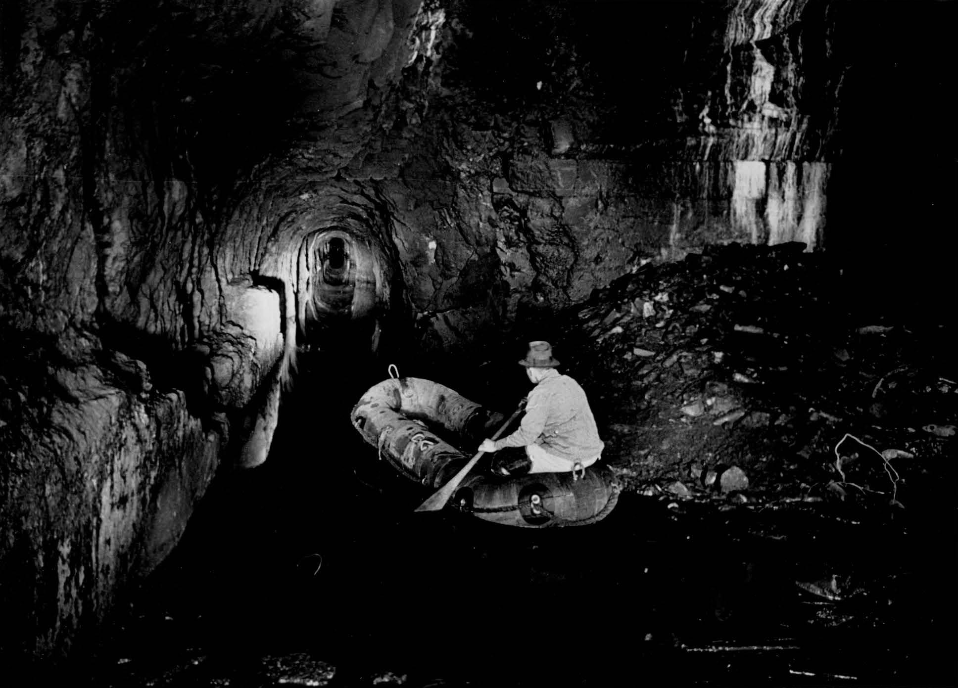 Von Kammer I aus gesehen. Die Kante rechts ist weggeschlagen, die Abschlussmauer total verschwunden. Explosion Munitionsmagazin Mitholz / Beilage Nr. 29a zu den Berichten des Untersuchungsrichters / Beilagen zu den geologischen Gutachten Reference code: E5150A#2008/190#204*